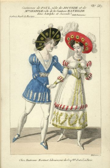 Paul et Madame Anatole, danseurs de l'Académie royale de musique (1827)